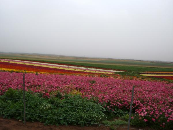 שדה נוריות בדרום הארץ